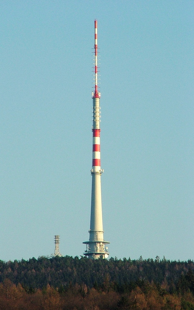 Vysílač Cukrák, odpolední pohled z Mokropes